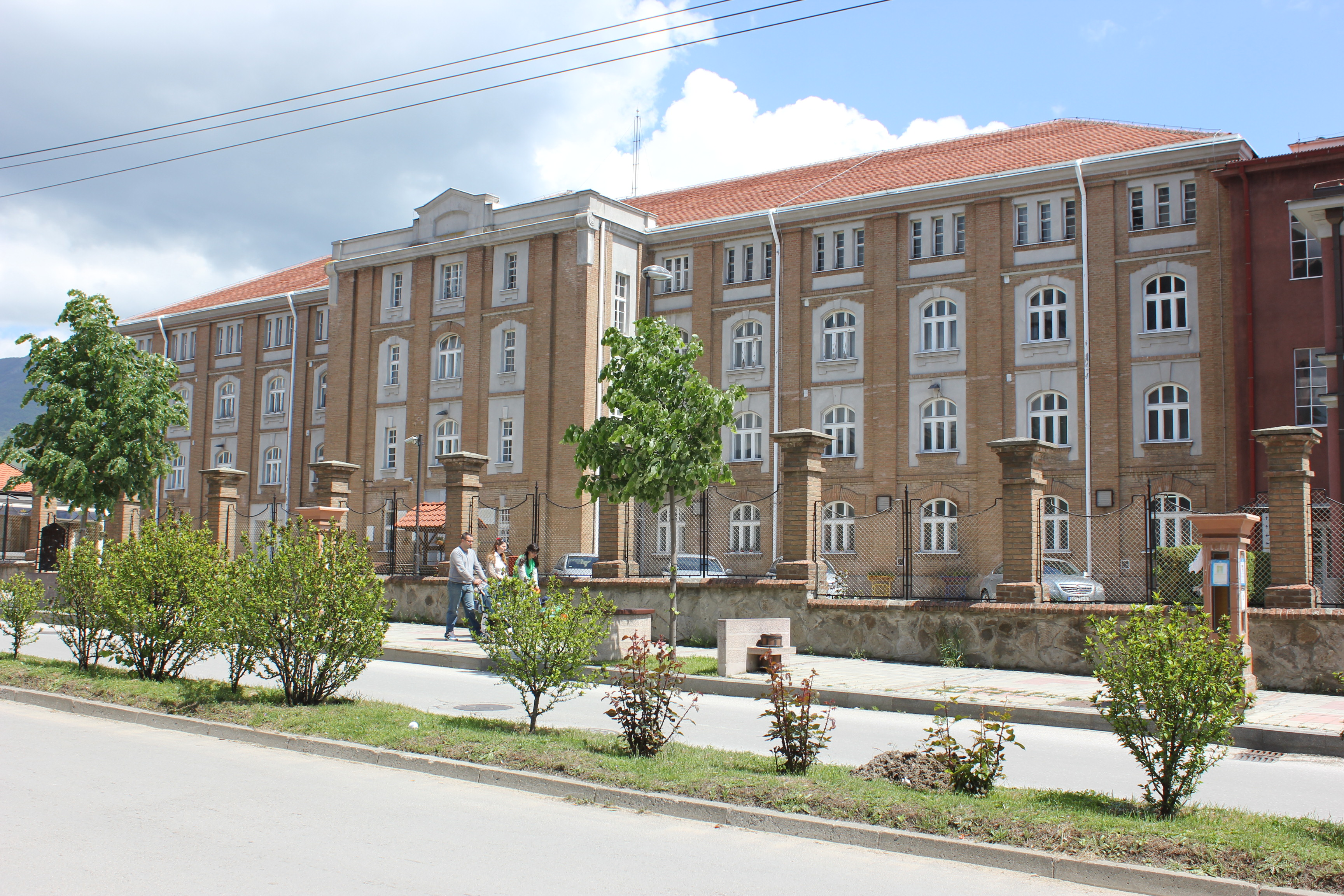 Тютюневата фабрика в град Враня, Сърбия.